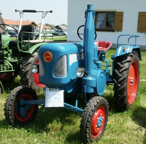 Lanz Bulldog D1906, Baujahr 1955, Halbdiesel, 19 PS, Hubraum: 2256 cm³, Halbdiesel, ventilloser Lanz-Zweitakt-Einzylinder-Glühkopf-Mitteldruckmotor